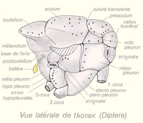 Vue latérale du thorax d'un diptère